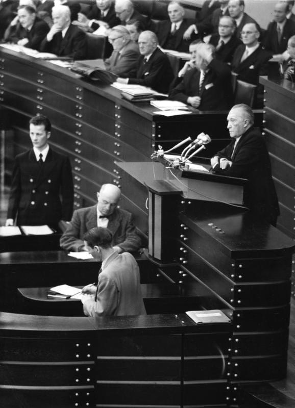 1. Lesung der Pariser Verträge im Deutschen Bundestag am 16. Dezember 1954 im Bild: Bundeskanzler Konrad Adenauer